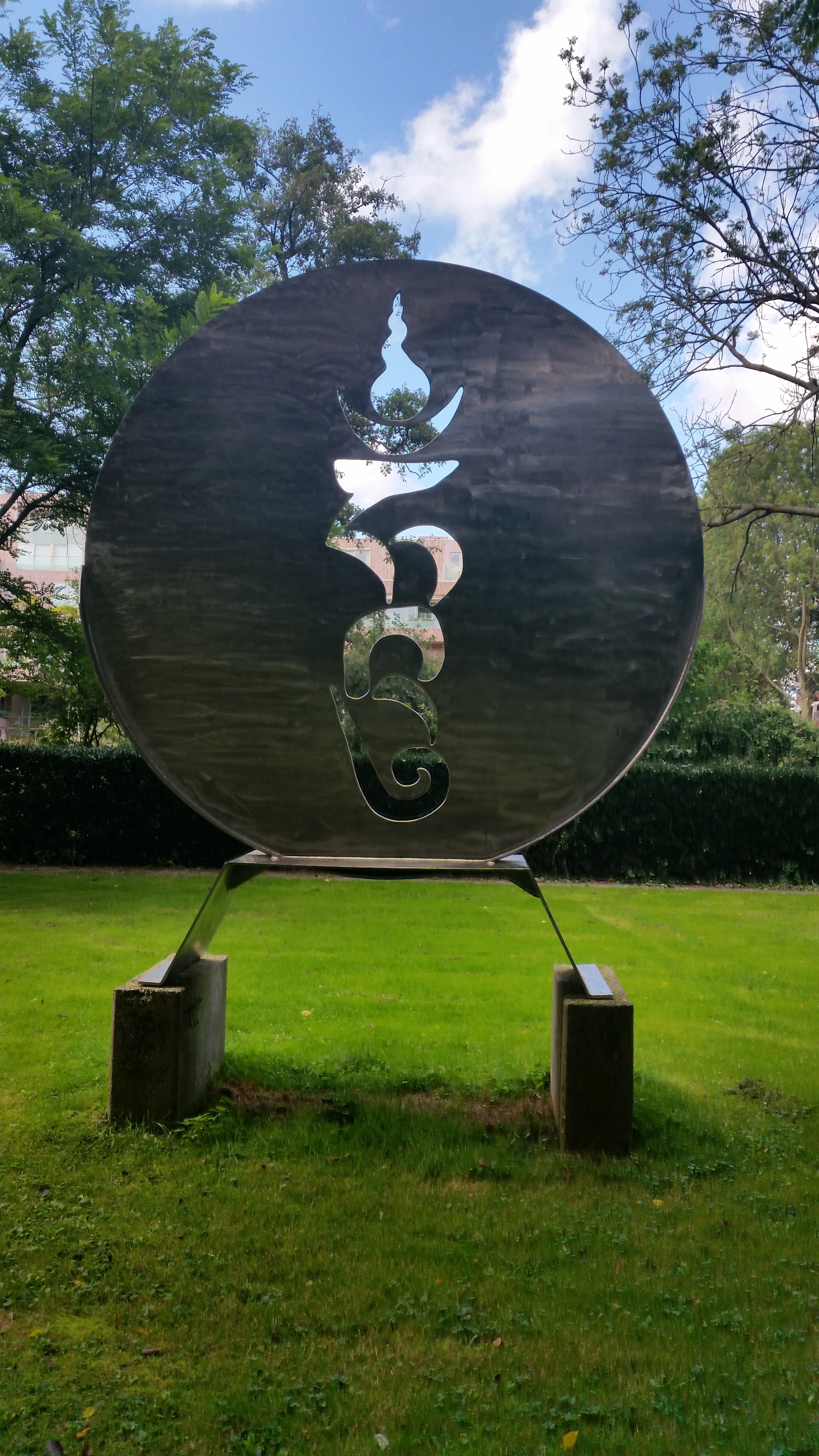 The long hum